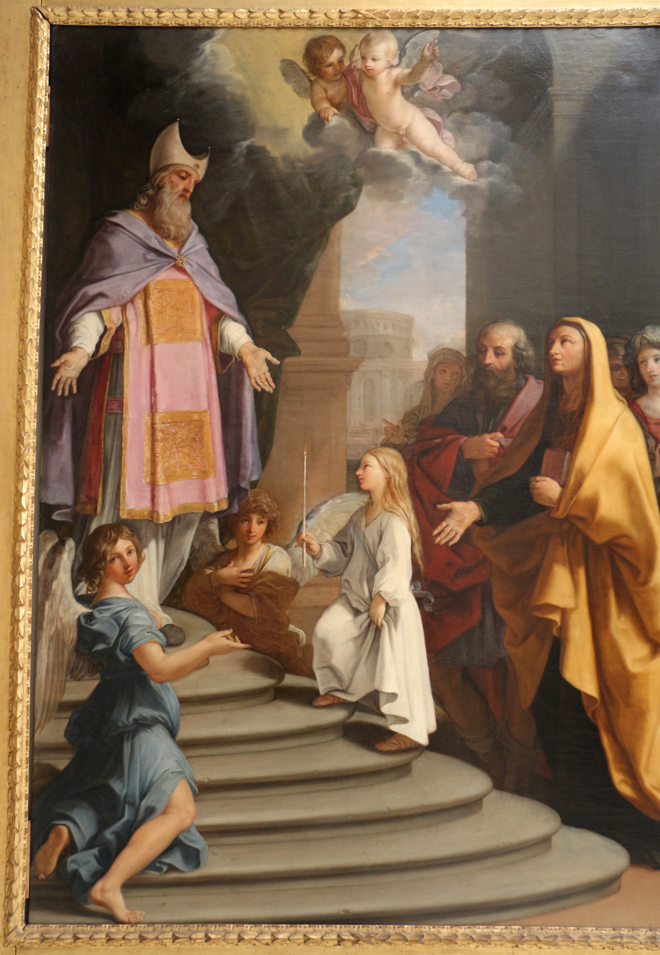 Pinacoteca Nazionale di Bologna This is a photo of a monument which is part of cultural heritage of Italy.